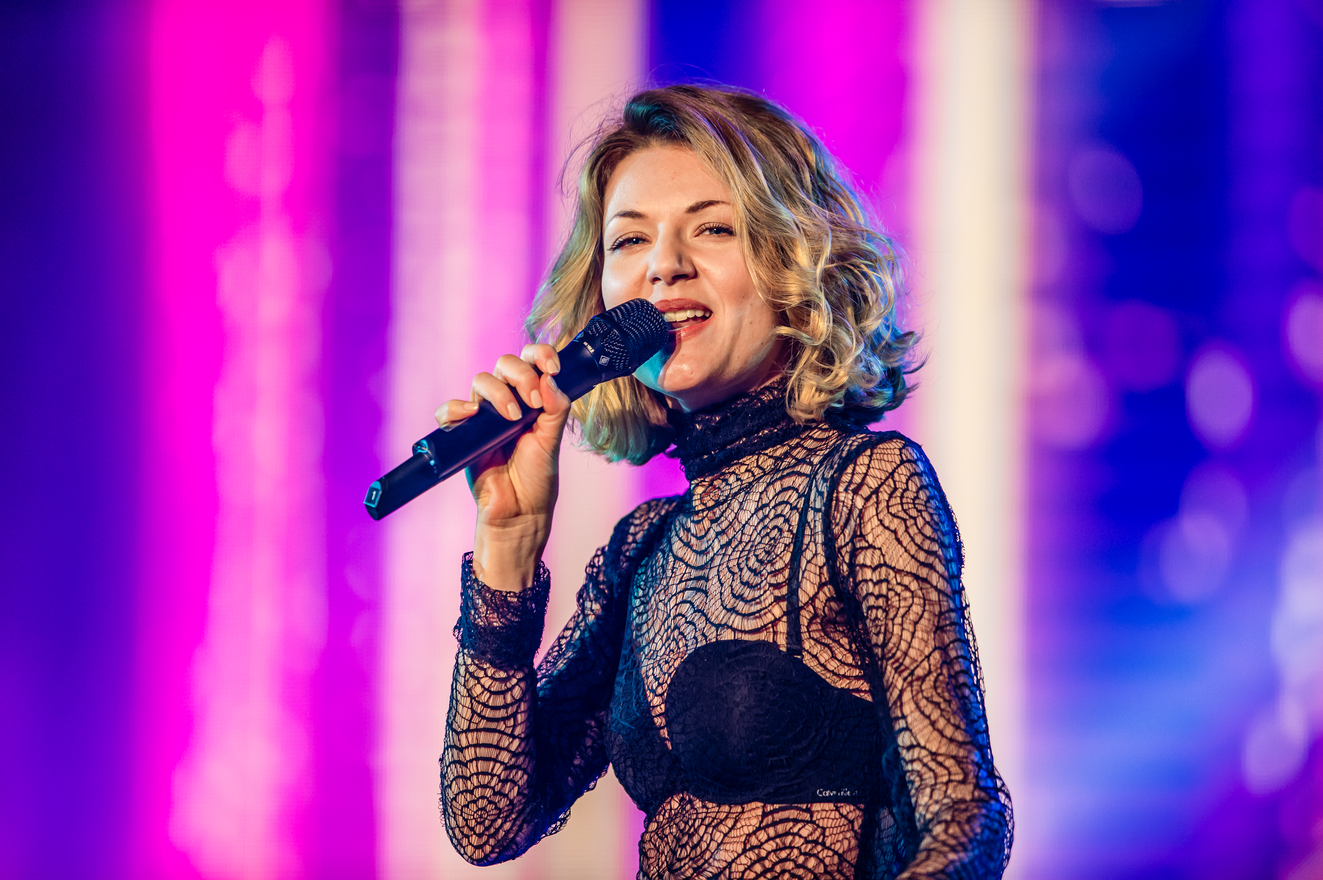 Eurovision Song Contest 2016 - Unser Lied für Stockholm - Ella Endlich